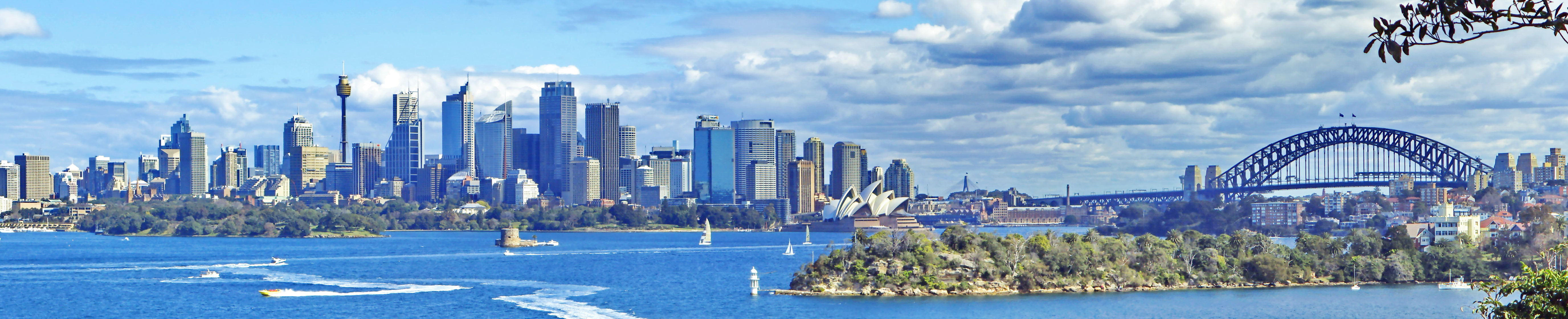 Sydney Skyline